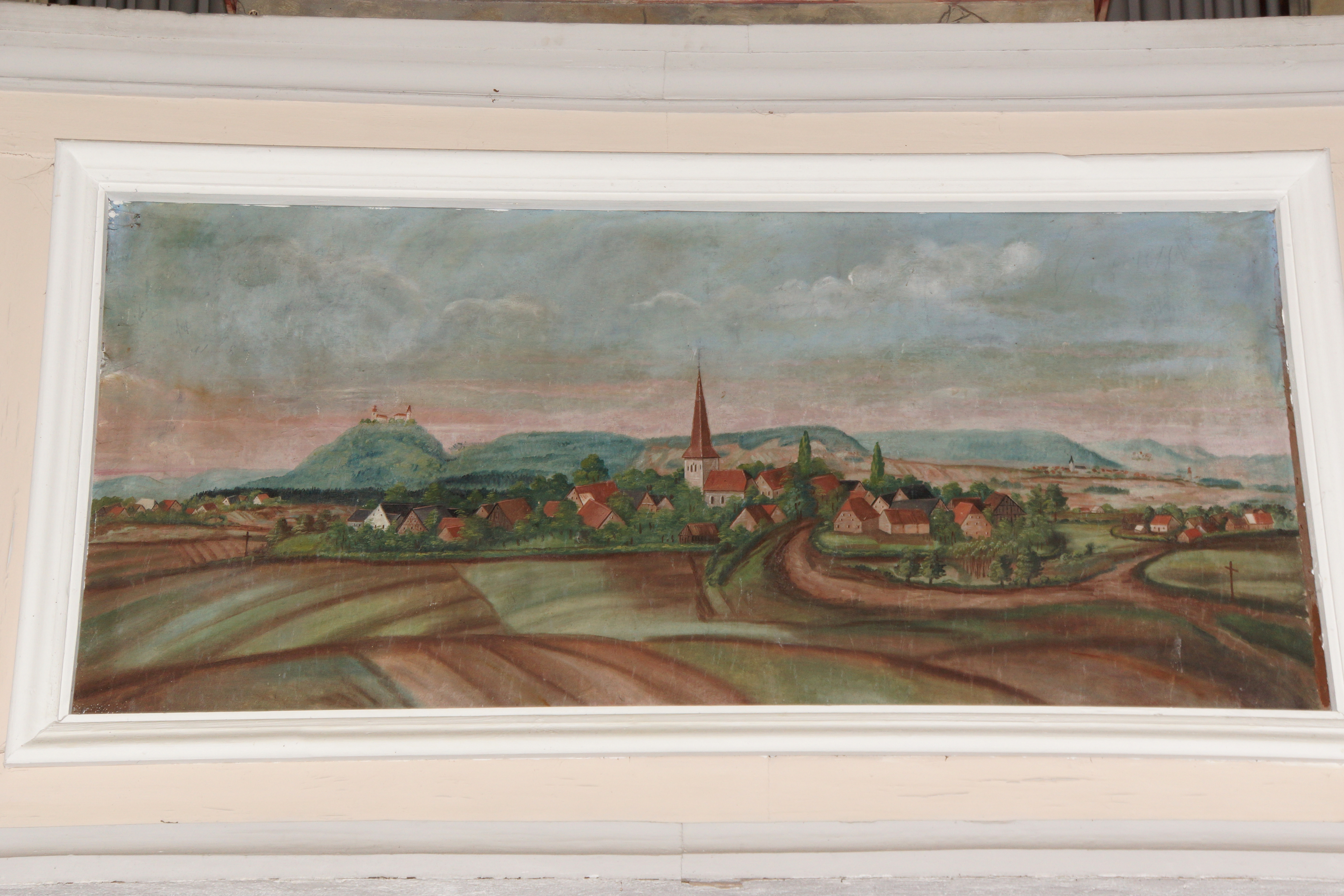 Die katholische Filialkirche St. Willibald in Groß-Thundorf